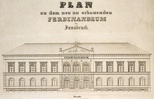 Anton Mutschlechner: Entwurf zum ersten Gebäude des Tiroler Landesmuseums Ferdinandeum, Innsbruck, 1842 (umgebaut 1884–1886)